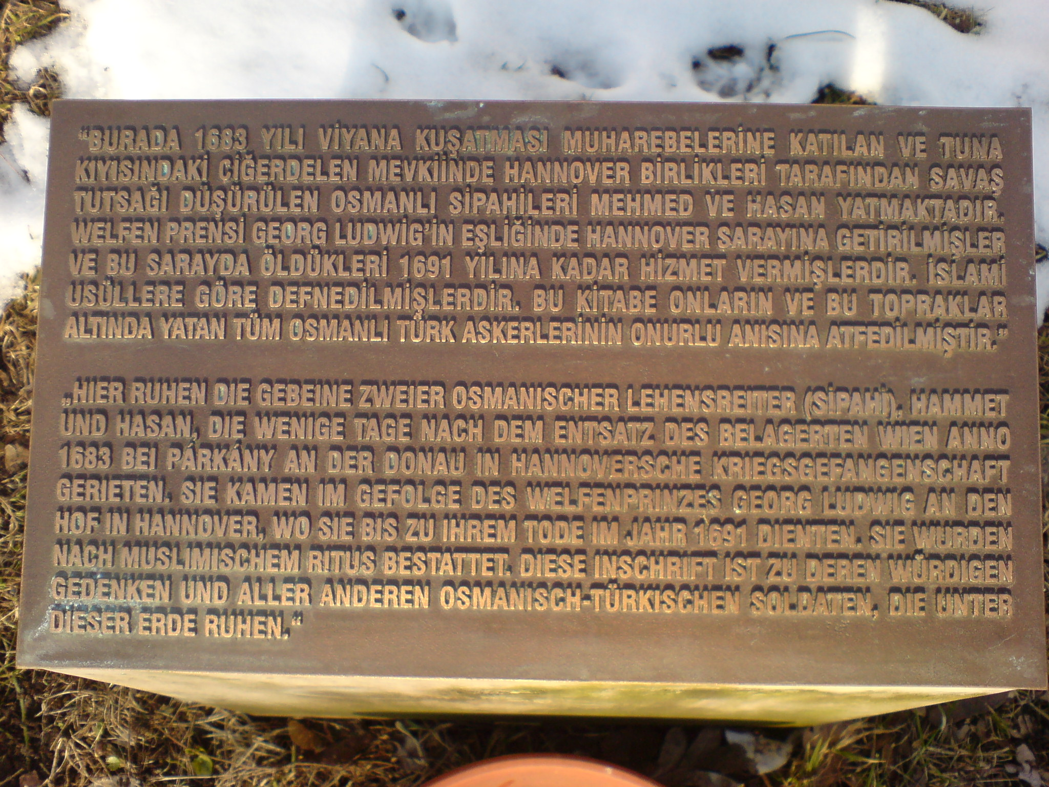 Grabplatte für Hammet (Mehmed) und Hasan von 1998 mit türkischen und deutschen Erläuterungen